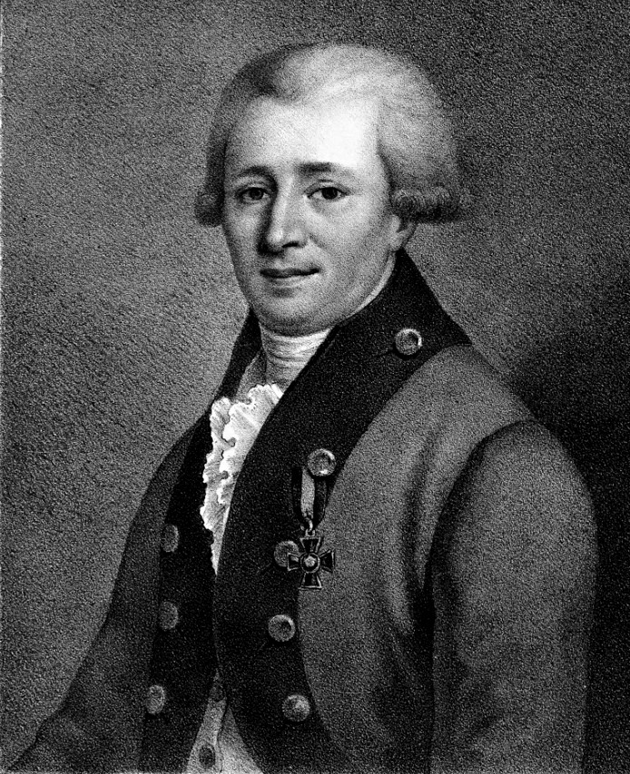 Николай Яковлевич Озерецковский (1750–1827), поясной портрет в мундире